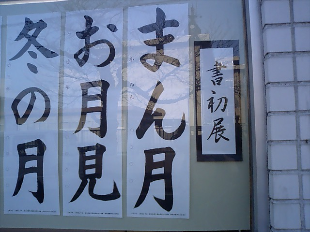 色々考えてしまいます。